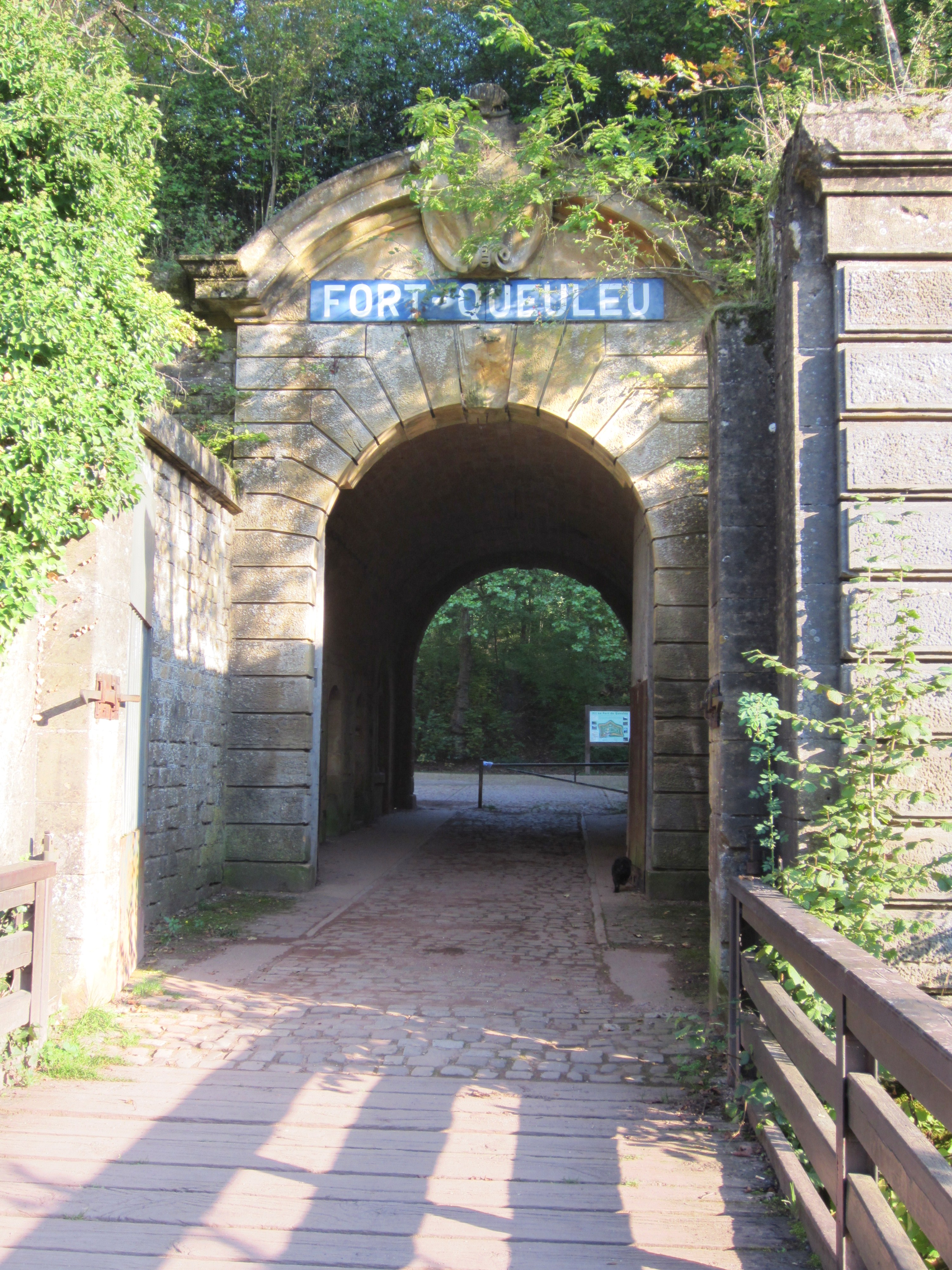 Description porte du fort Queuleu Metz Date26 September 2011Sourcemon appareil photoAuthorAimelaimePermission (Reusing this file) porte du fort Queuleu Metz